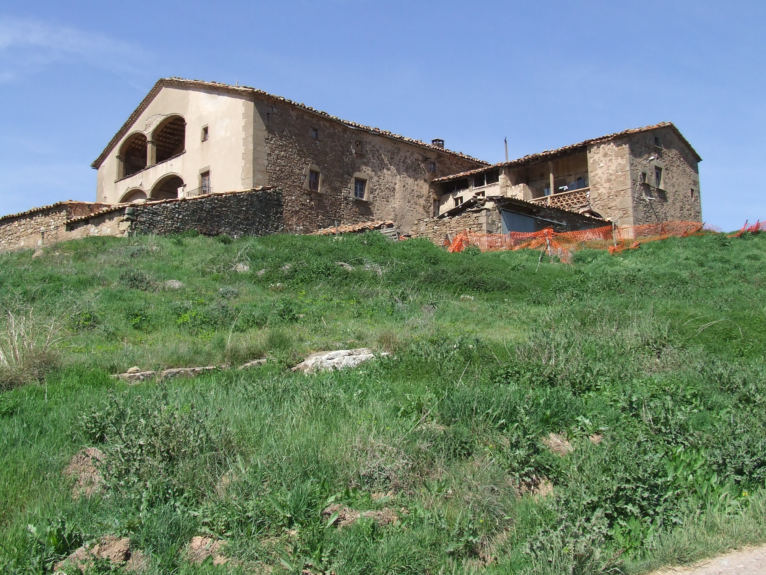 La Crossa (l'Estany, Moianès)